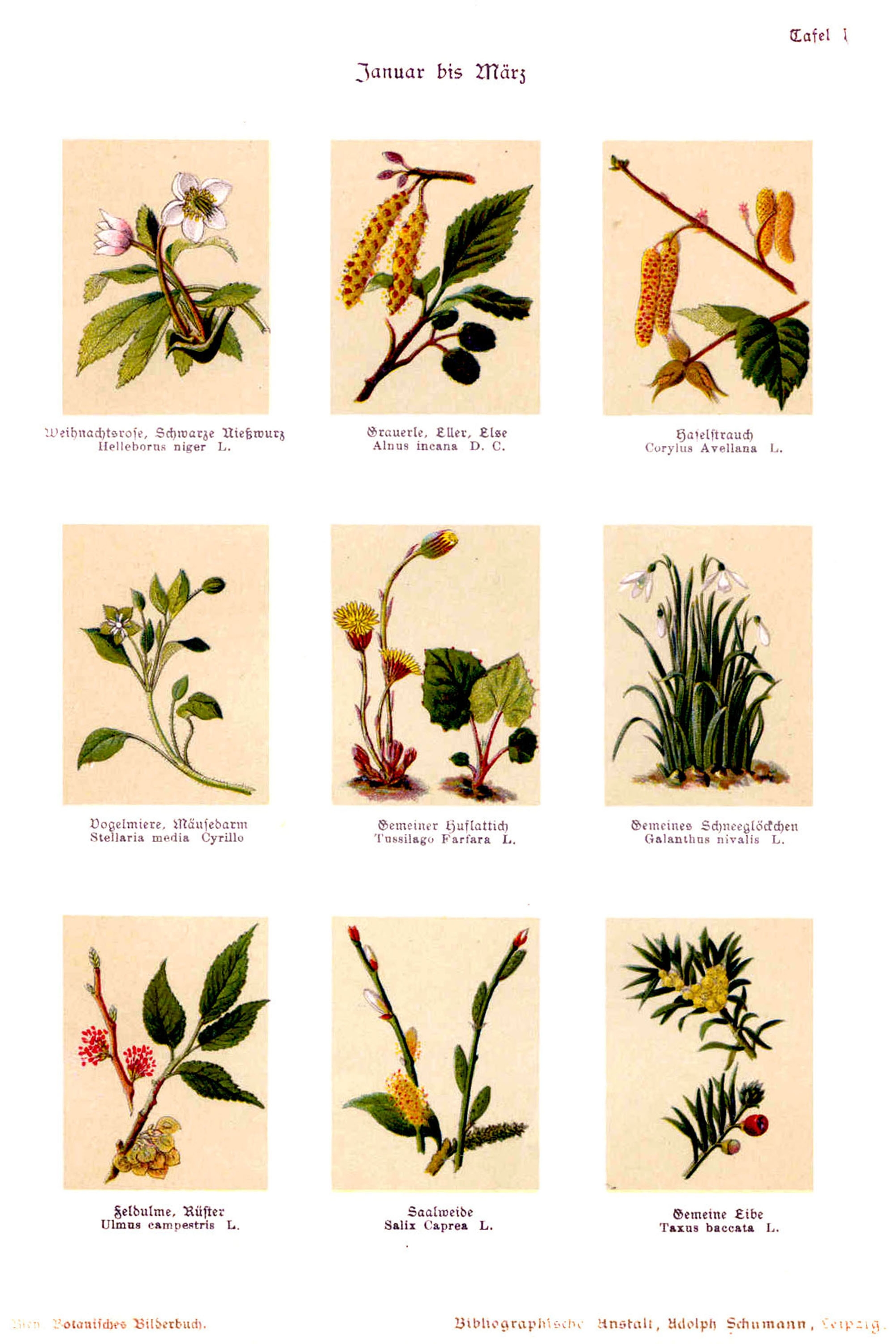 See below